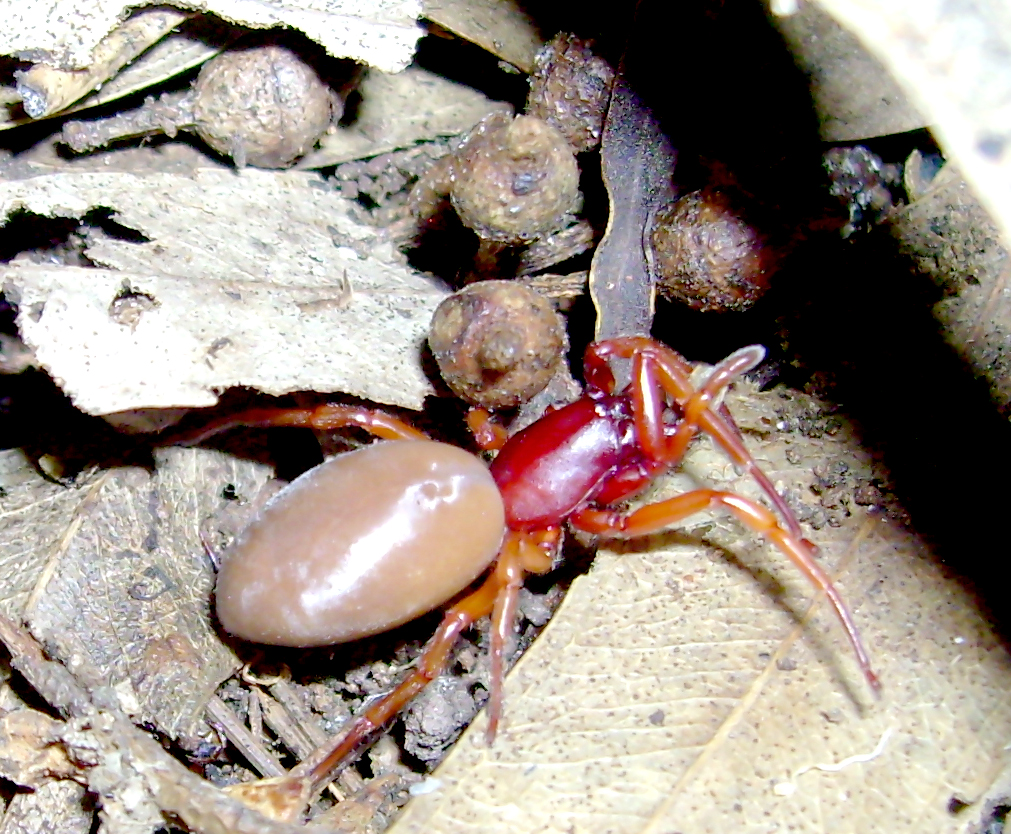 Disdera